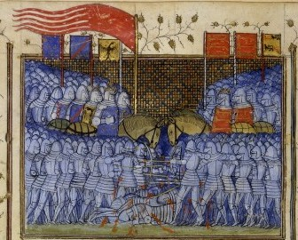 Battle of Crécy